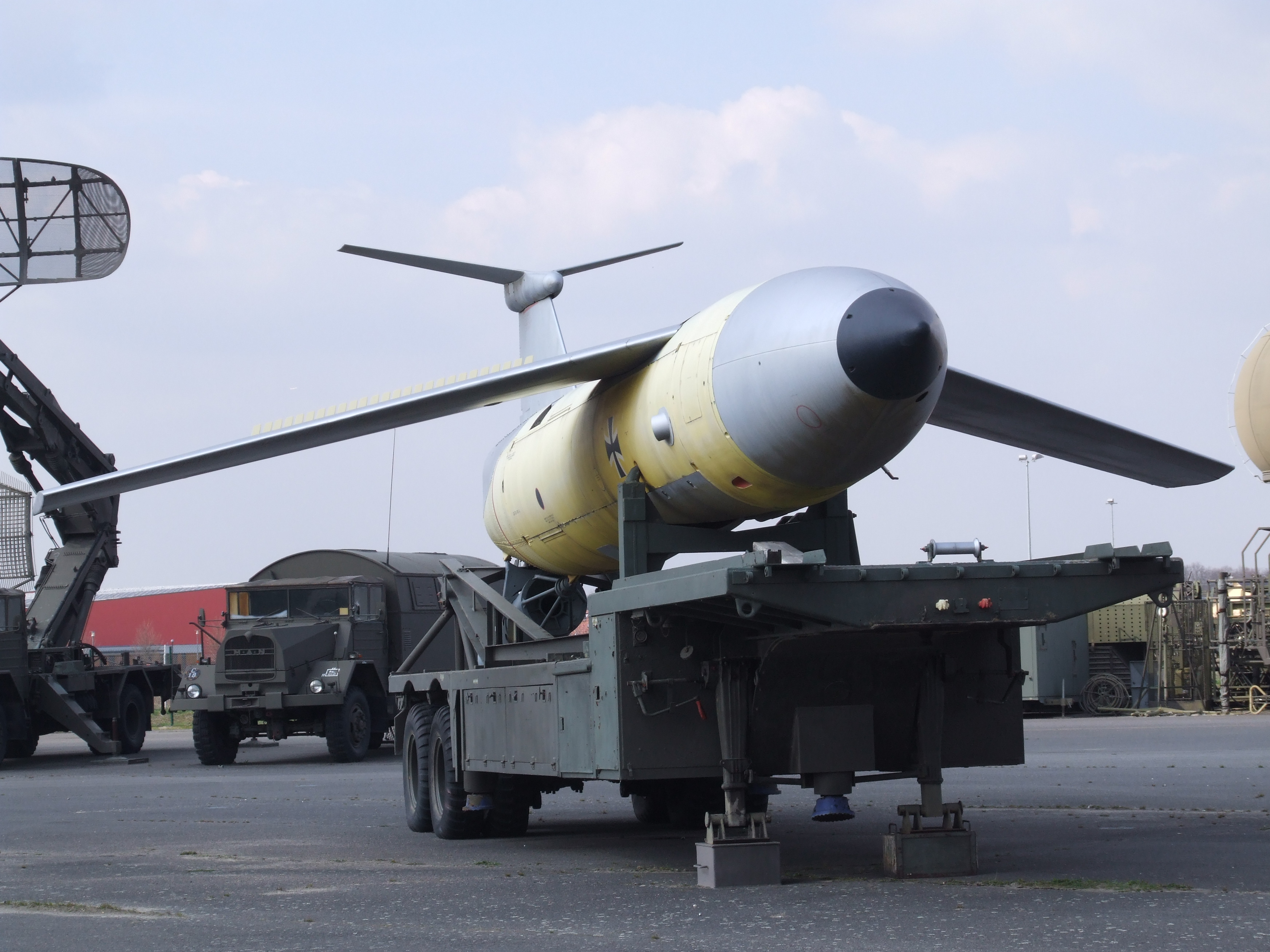 Marschflugkörper MATADOR im Luftwaffenmuseum Berlin Gatow